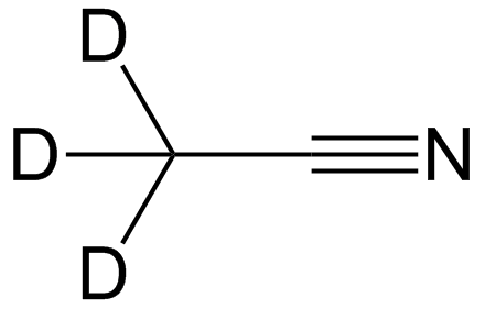 Gedeutereerd acetonitril